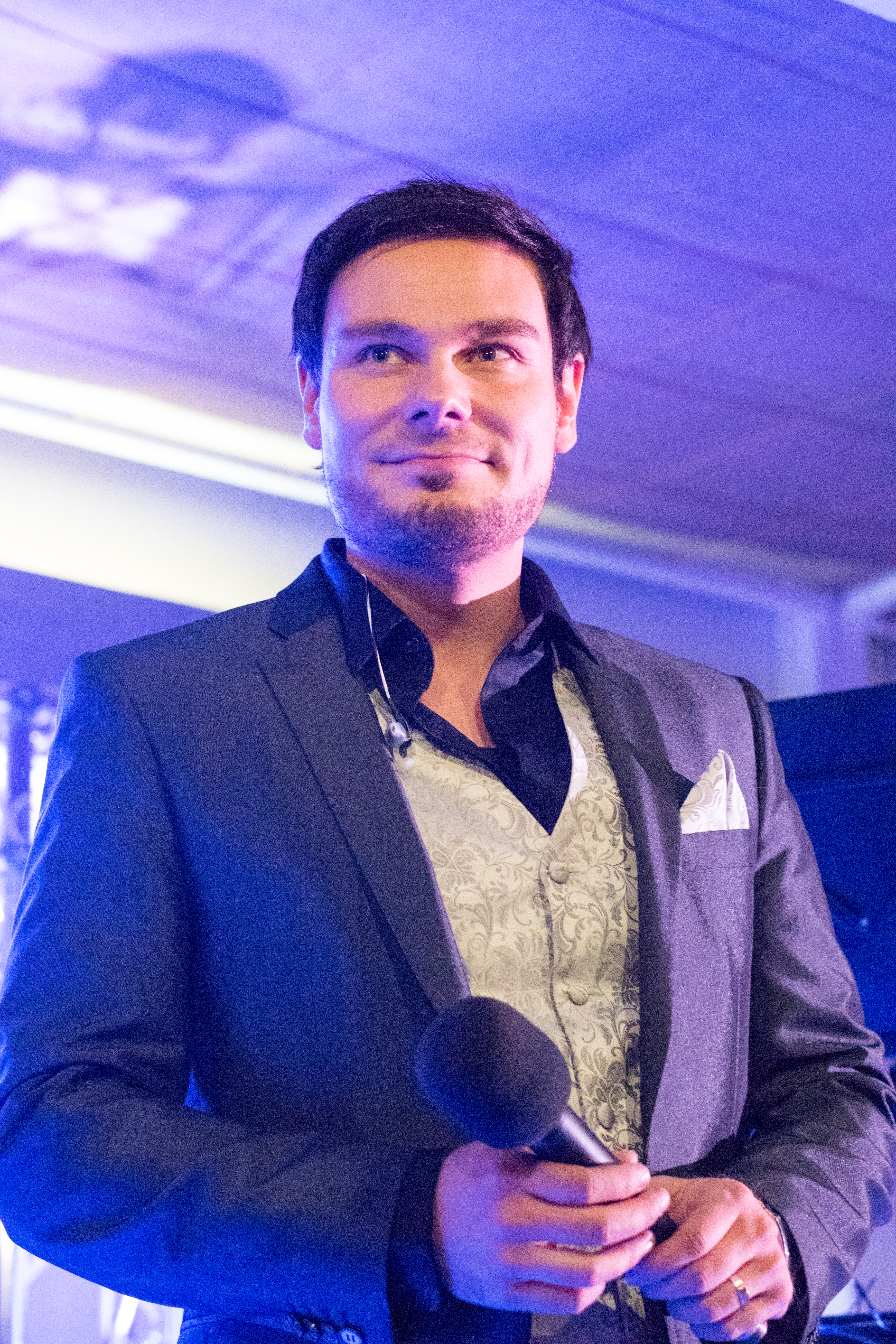 Tommi Soidinmäki